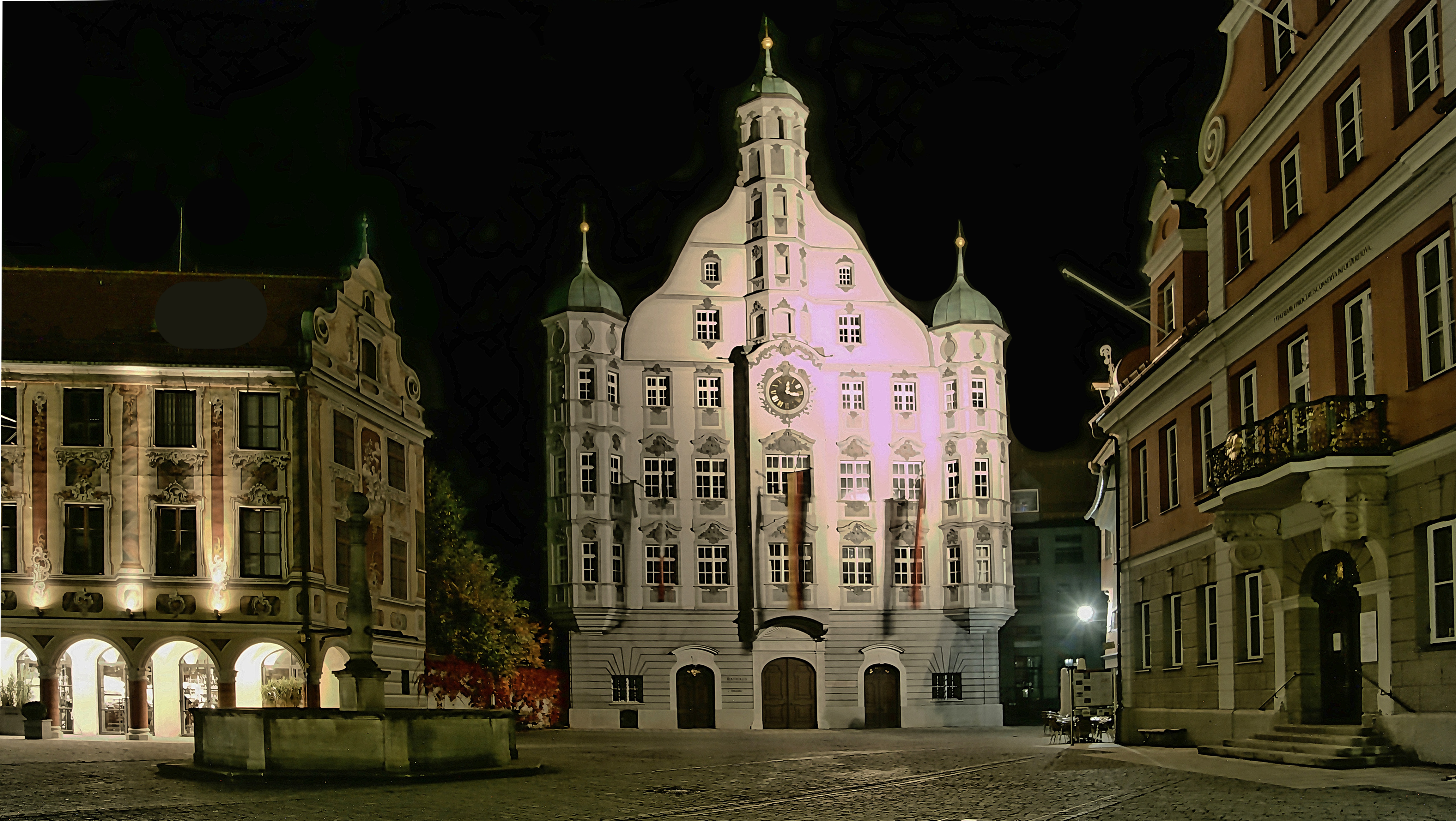 Memmingen - Rathaus um Mitternach